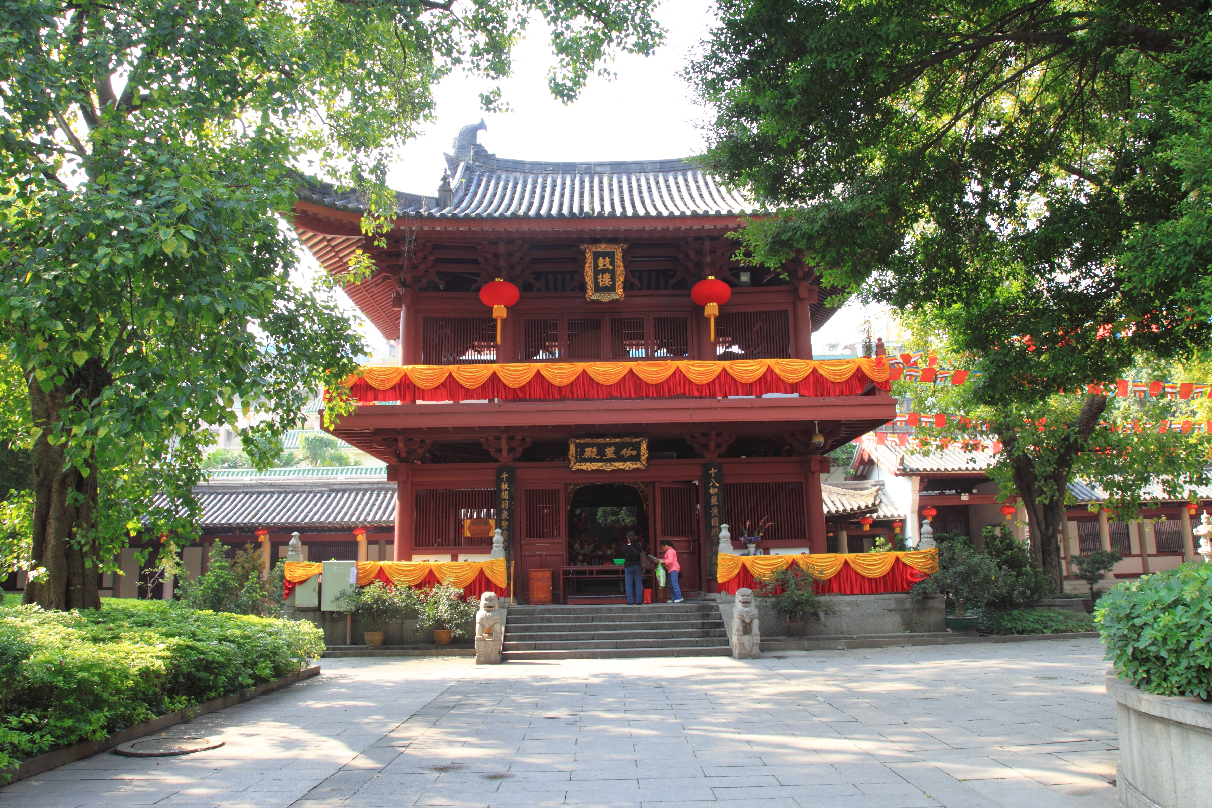 广州光孝寺 —— 鼓楼